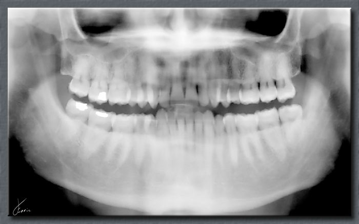 Ortopantomografía